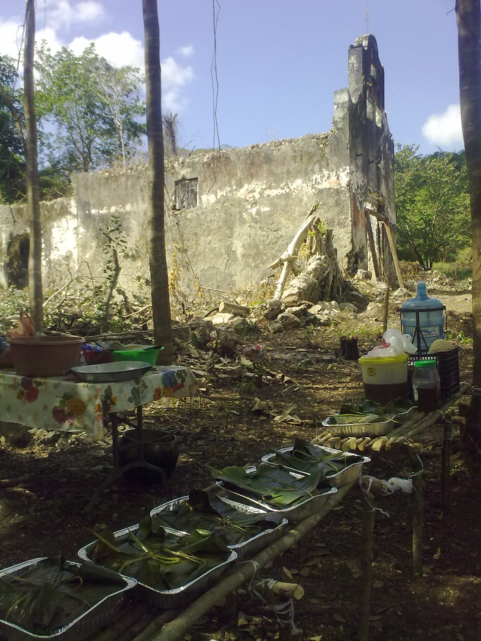 pibipollos en espera de ser enterrados